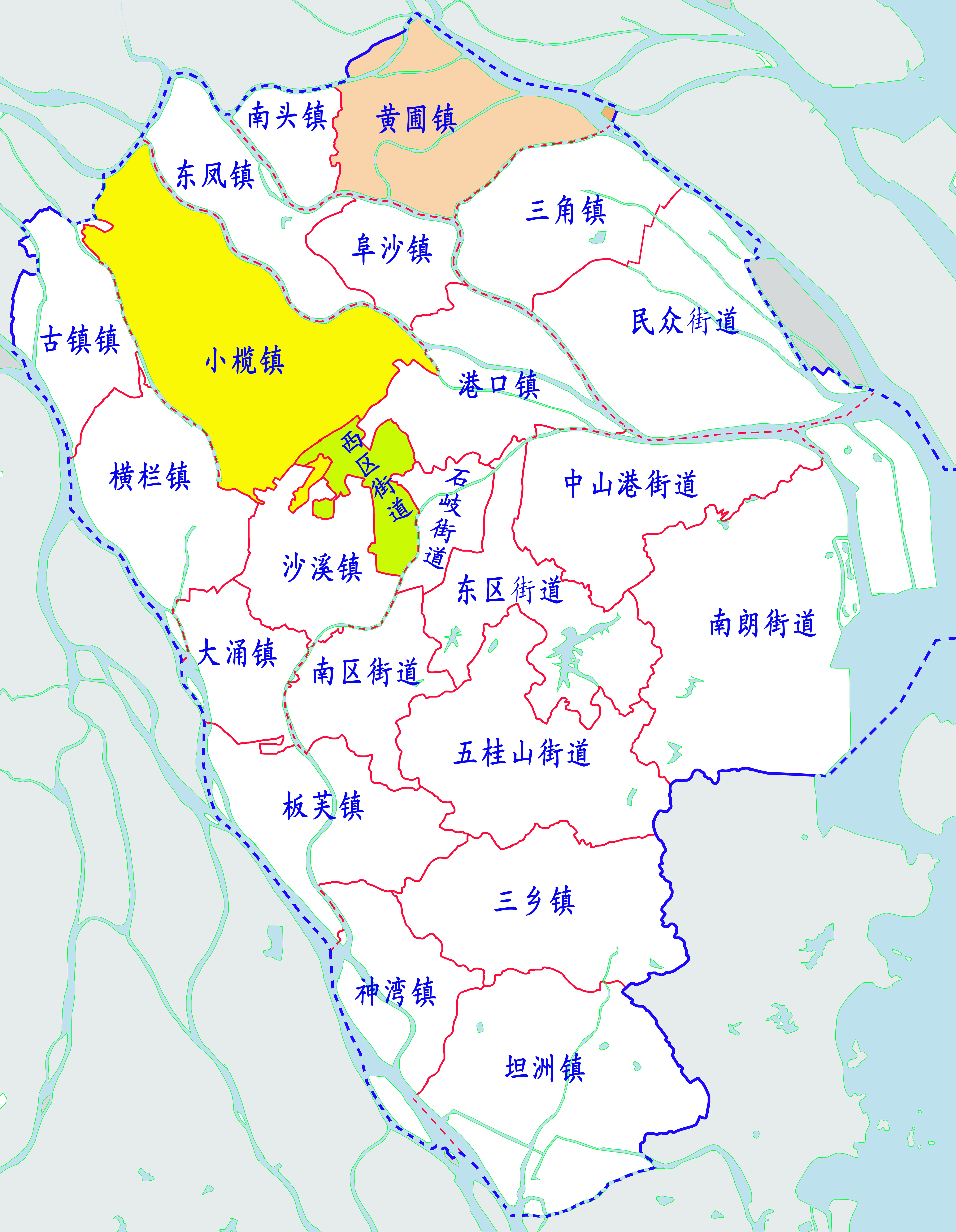 중산시 행정구역